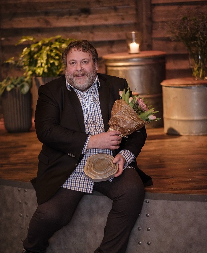 Årets Grundare Väst, Torsten Jansson, grundare av New Wave Group vid Entreprenörsgalan 2017